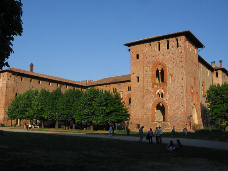 Vigevano, Lombardia, Italia